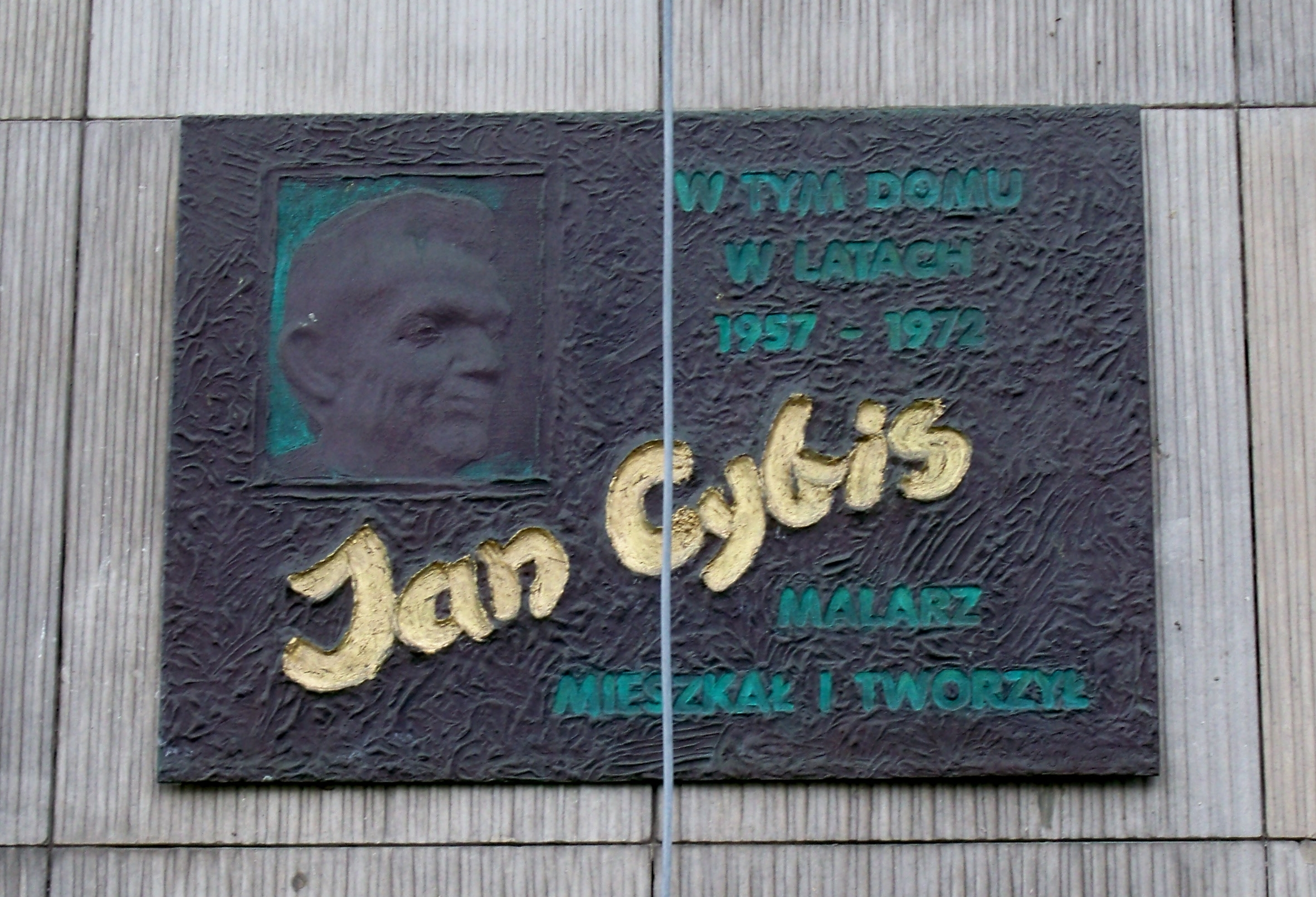 Tablica upamiętniająca Jana Cybisa. Ul. Karowa 14/16 w Warszawie.